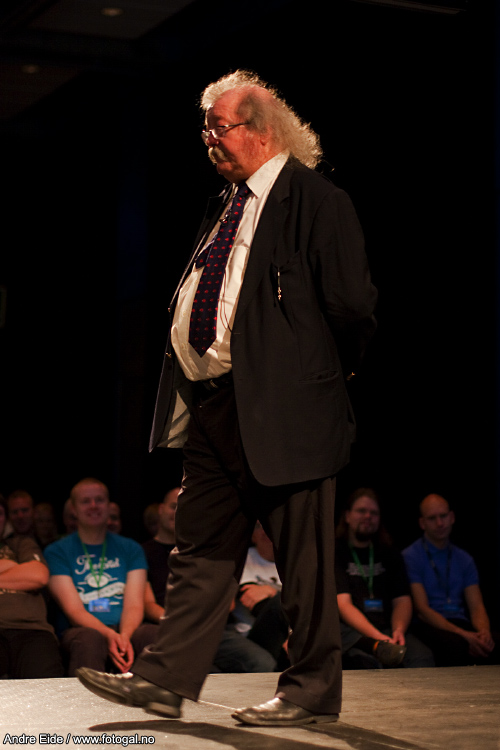 Jon Bing